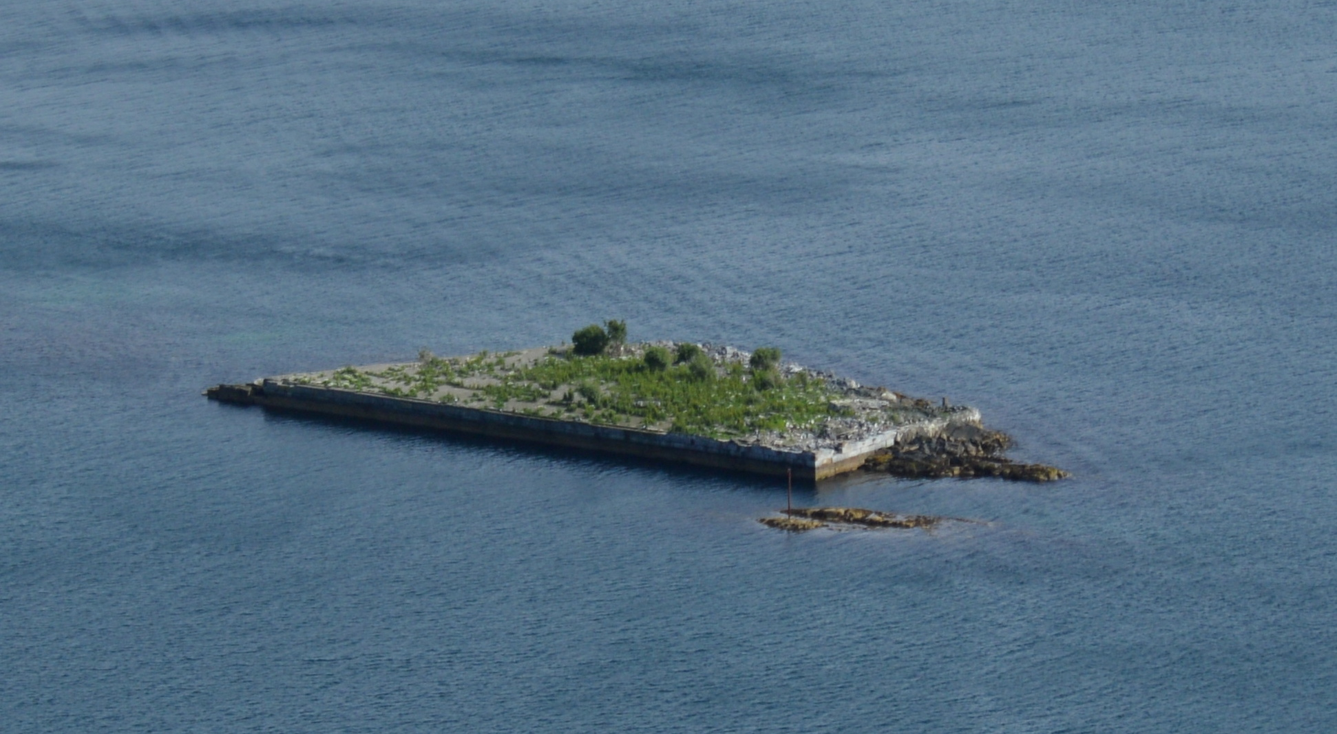 Balholmen